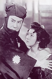 『鞍馬天狗 龍攘虎搏の巻』、1938年、スチル写真